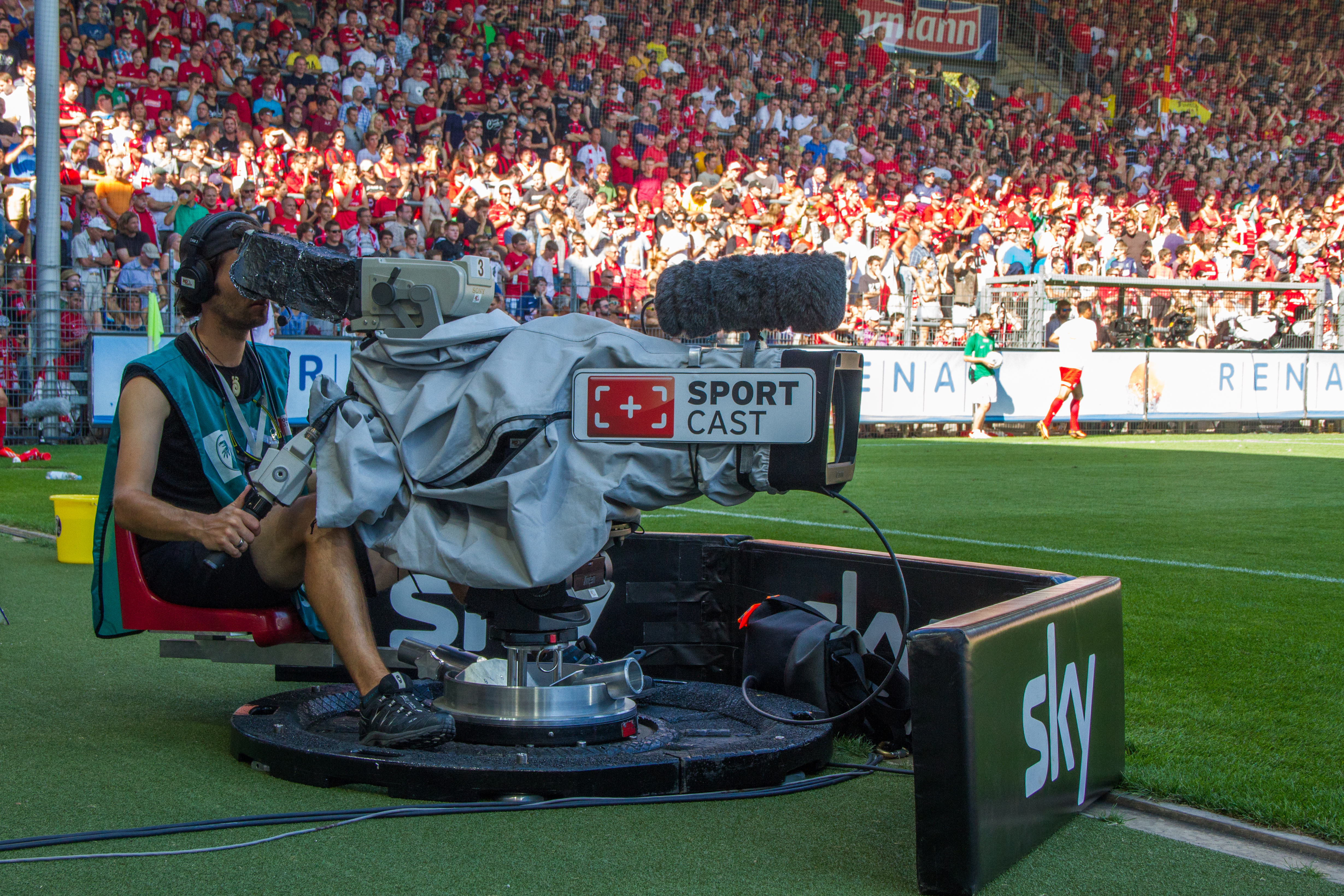 SC Freiburg vs FSVMainz 17 août 2013